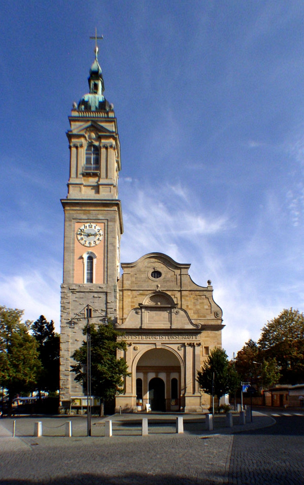 Eisenach, Georgenkirche, Westseite